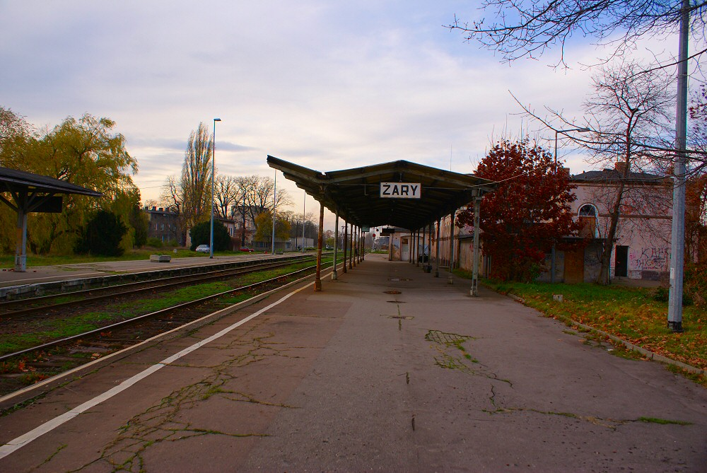 Widok na perony w Żarach